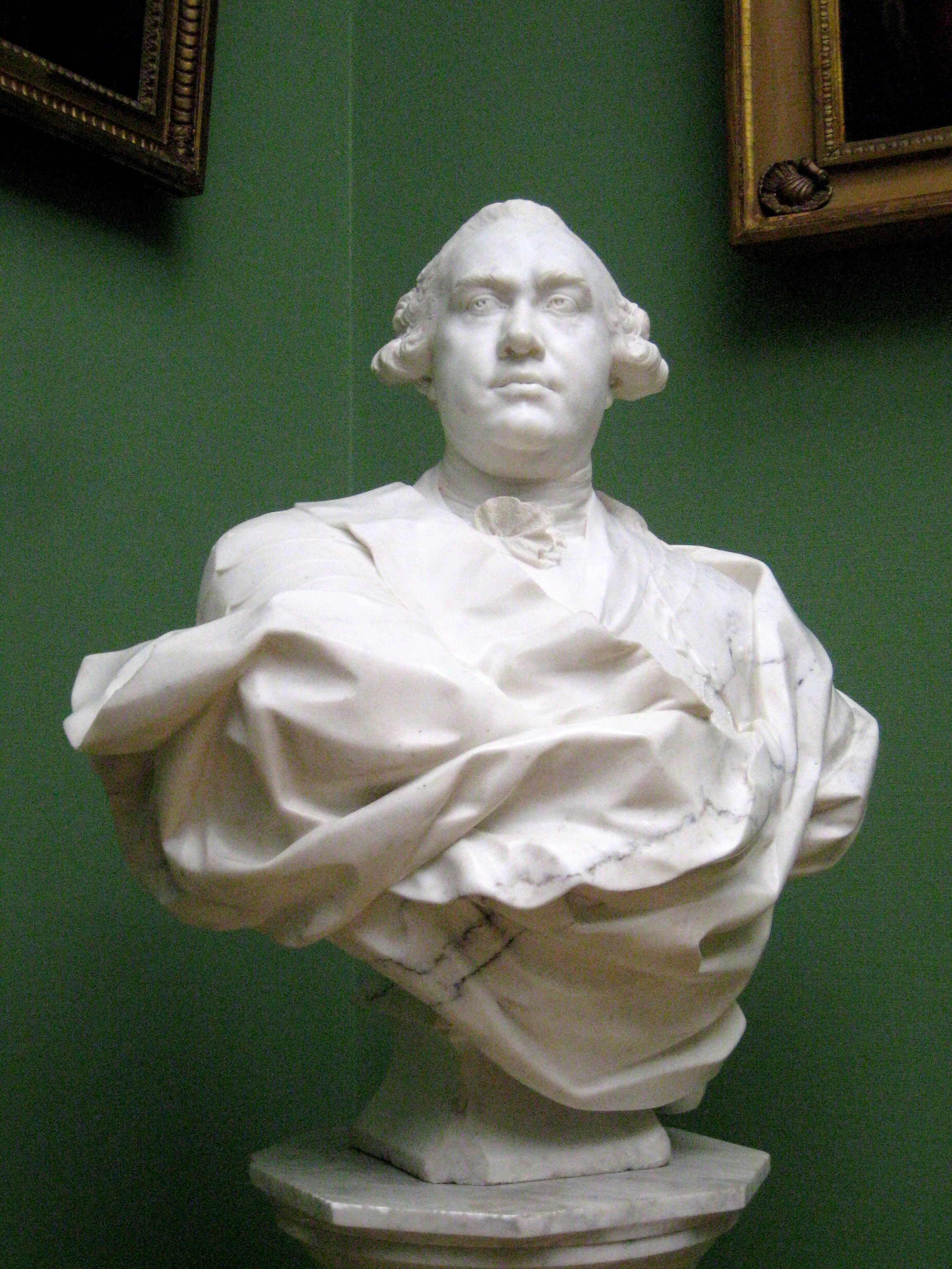 Андре-Жан Лебрен (1737-1811). Портрет графа К.Г. Разумовского. 1766. Мрамор. ГТГ